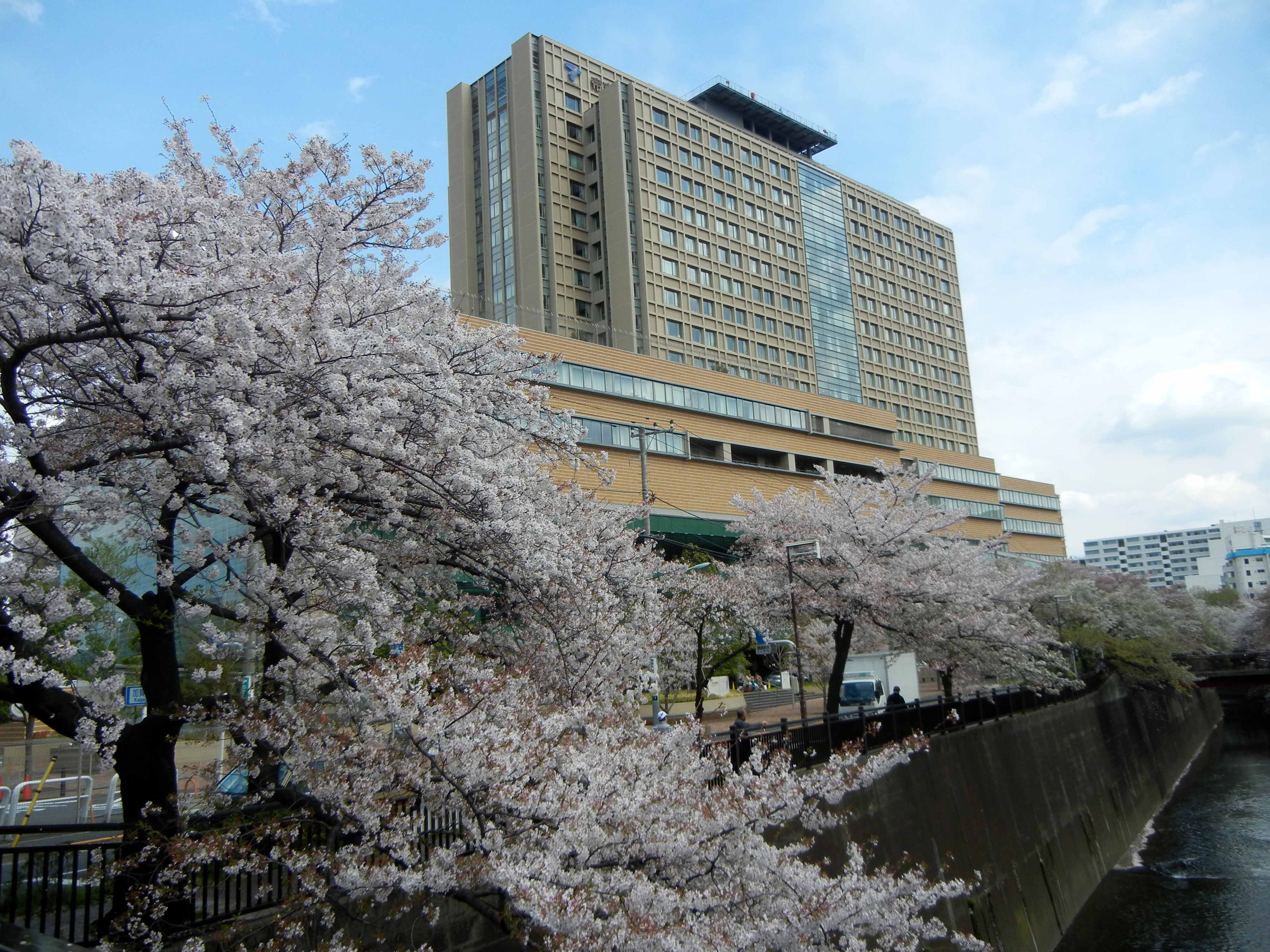 帝京大学板橋キャンパス 医学部附属病院